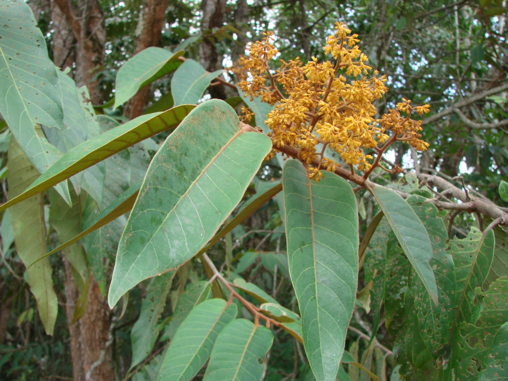 Virola sebifera - MYRISTICACEAE Jardim Botânico de Brasília - Distrito Federal - Brasil.